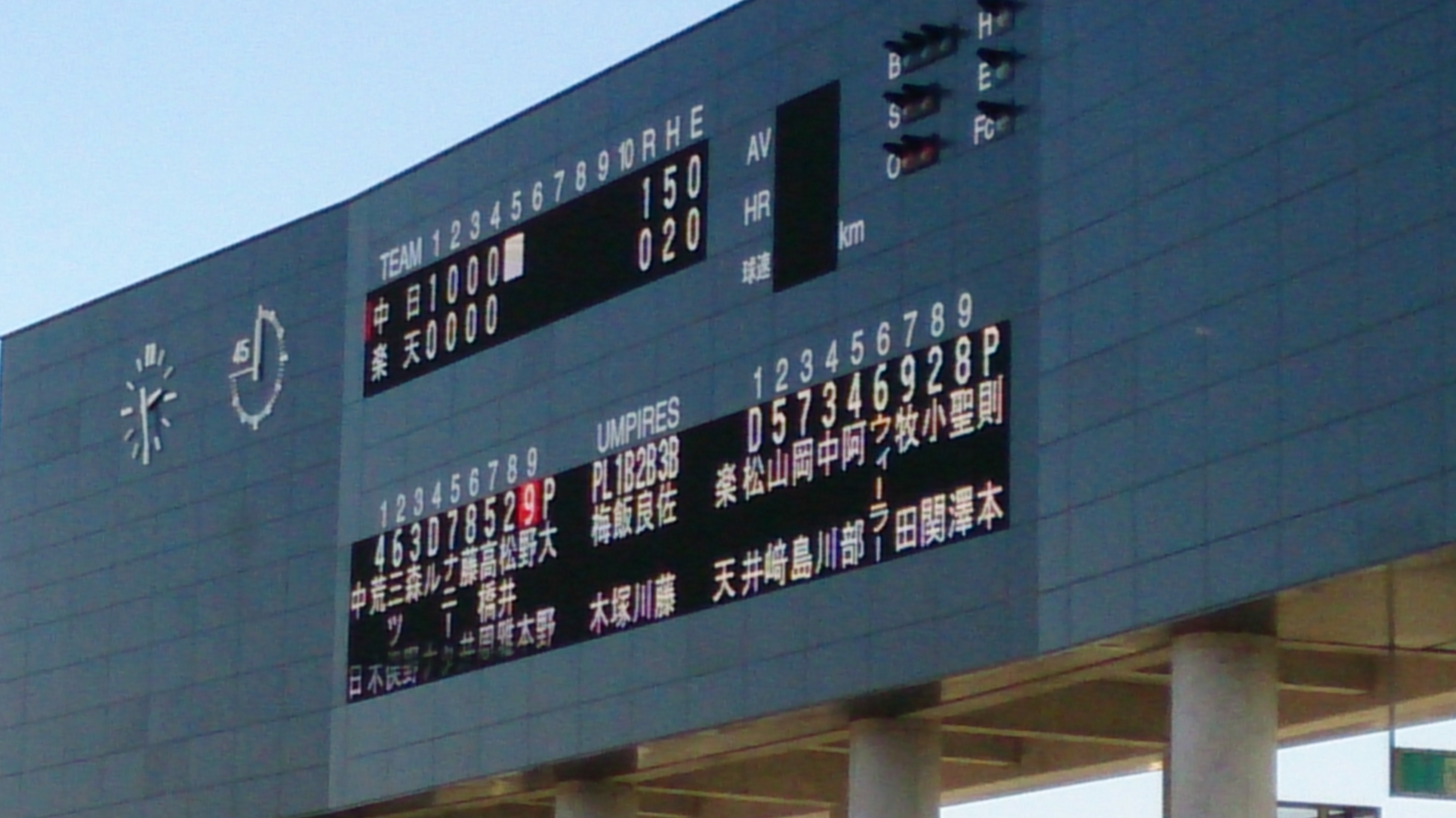 更新後のスコアボードです。 2015年3月8日撮影(東北楽天ゴールデンイーグルスと中日ドラゴンズとのオープン戦にて)